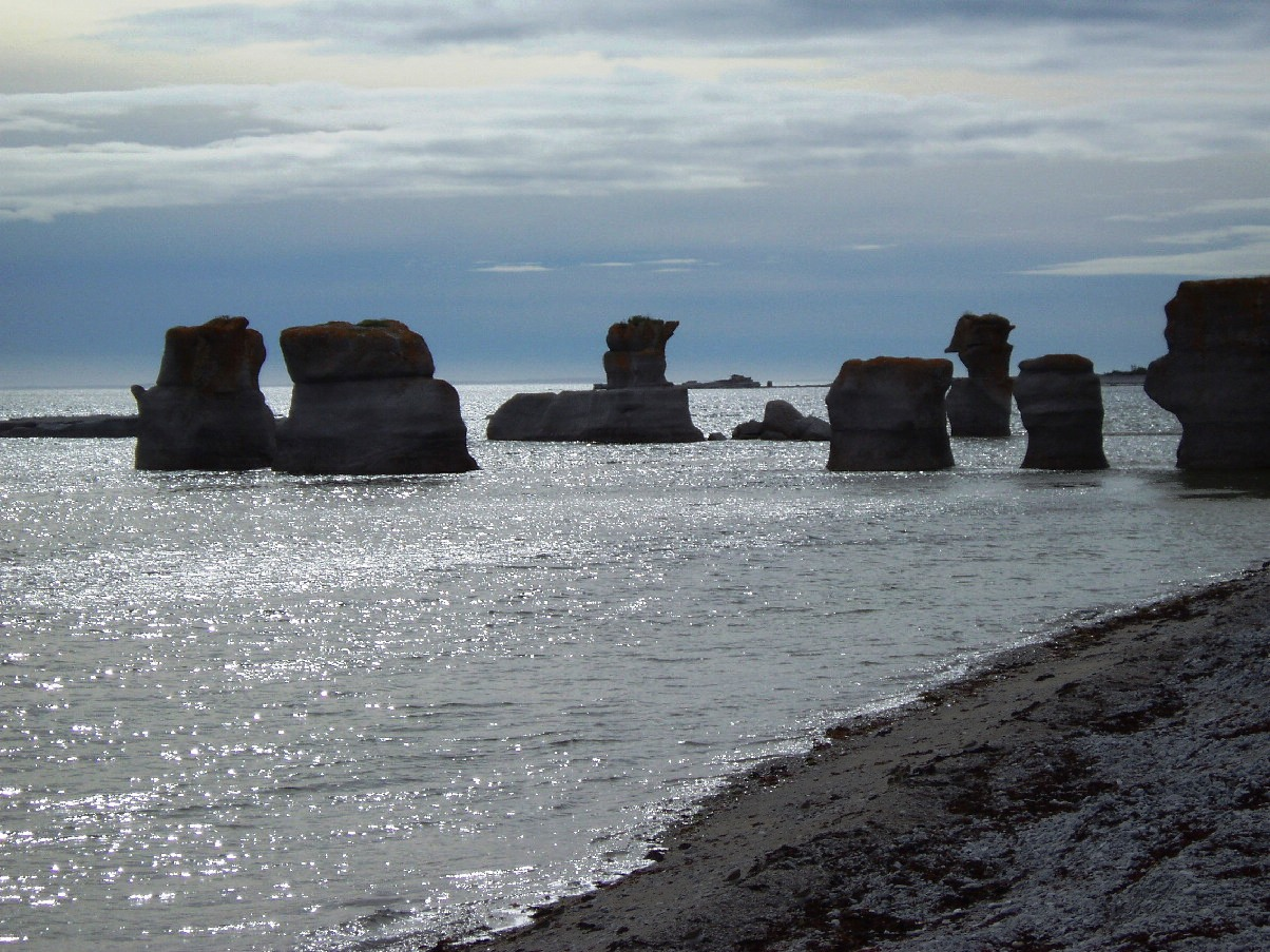 Monolithen auf der Insel Quarry vor Havre-St-Pierre an der Côte-Nord, Québec, Kanada.